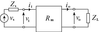 Transresistansforsterkarorsterkar